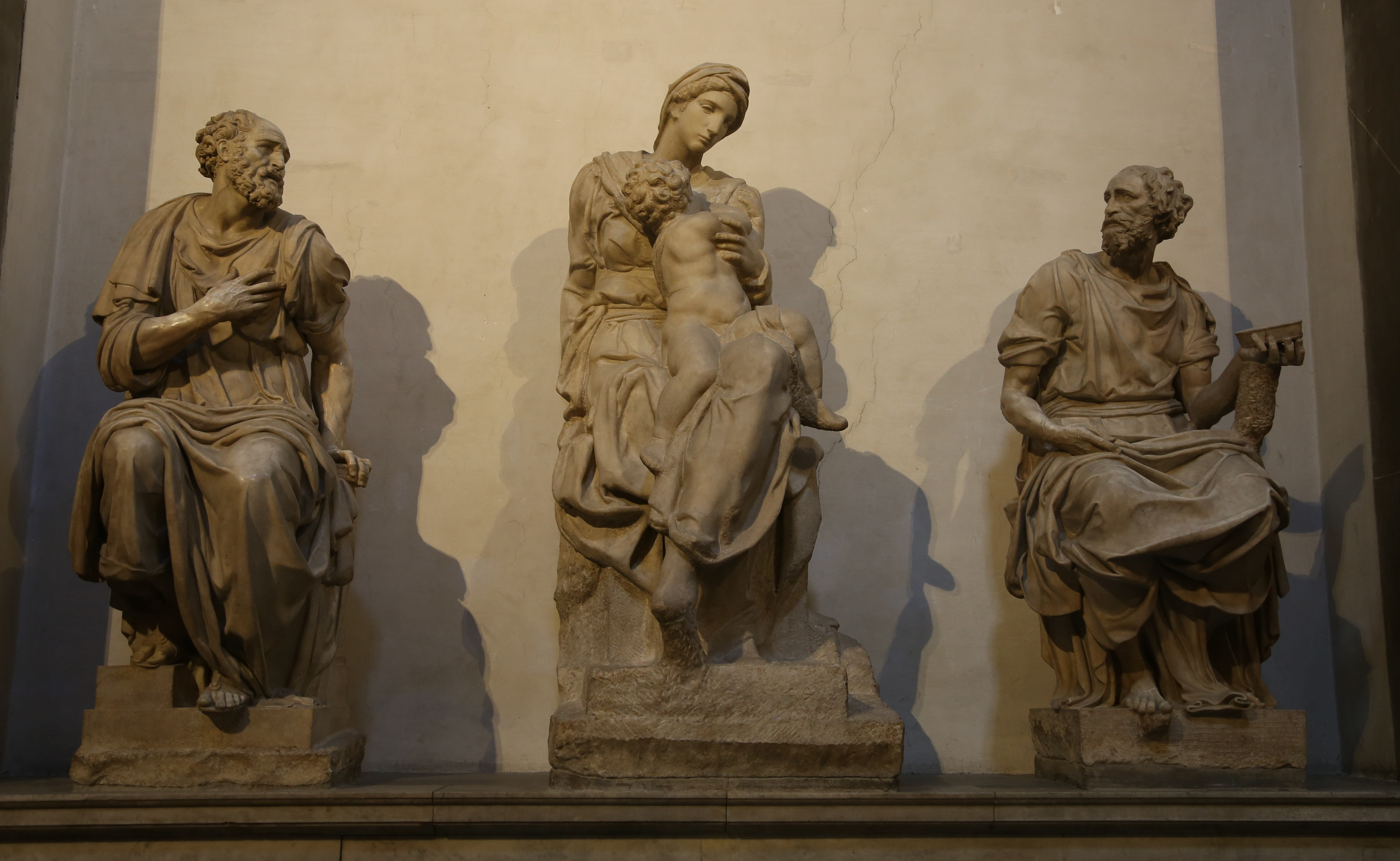 Medici-Kapelle, Florenz Mitte: Madonna mit Kind von Michelangelo links: St. Cosmas von Giovanni Angelo Montorsoli rechts: St. Damian von Raffaello da Montelupo